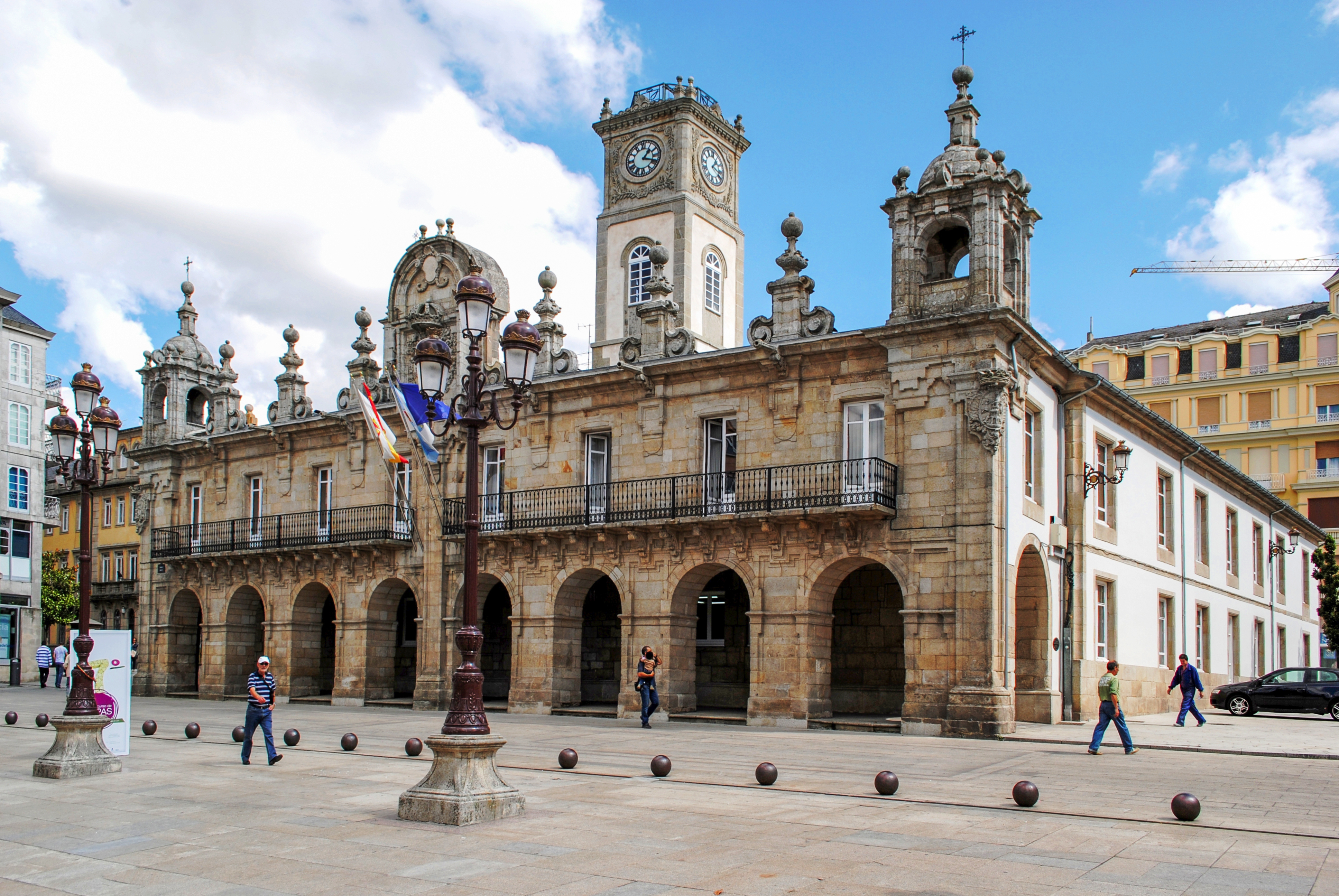 Casa Consistorial, Lugo